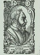 Giambattista Giraldi Cinzio (1504-1573)